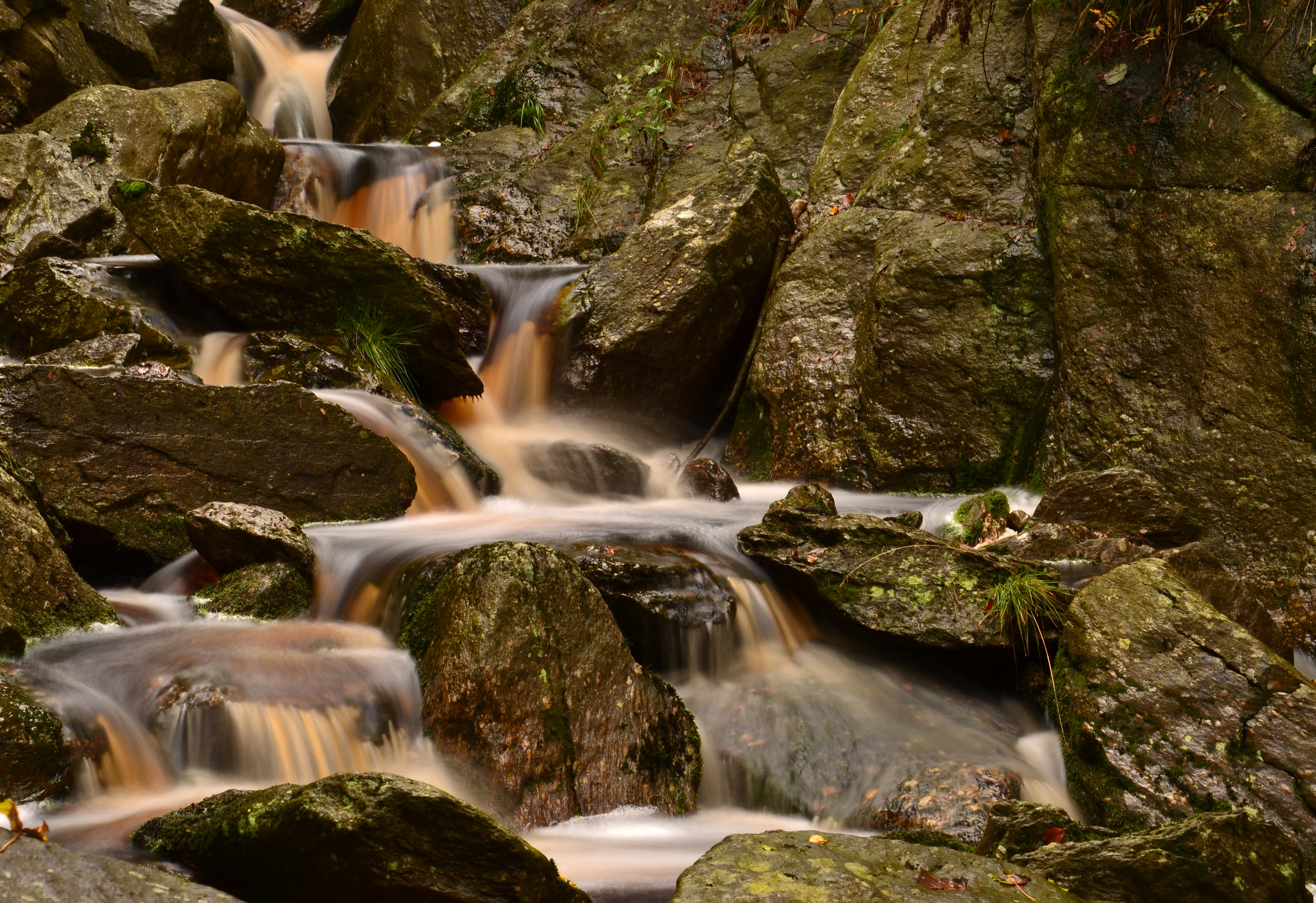 Přírodní park Bezručovo údolí - Medvědí vodopád